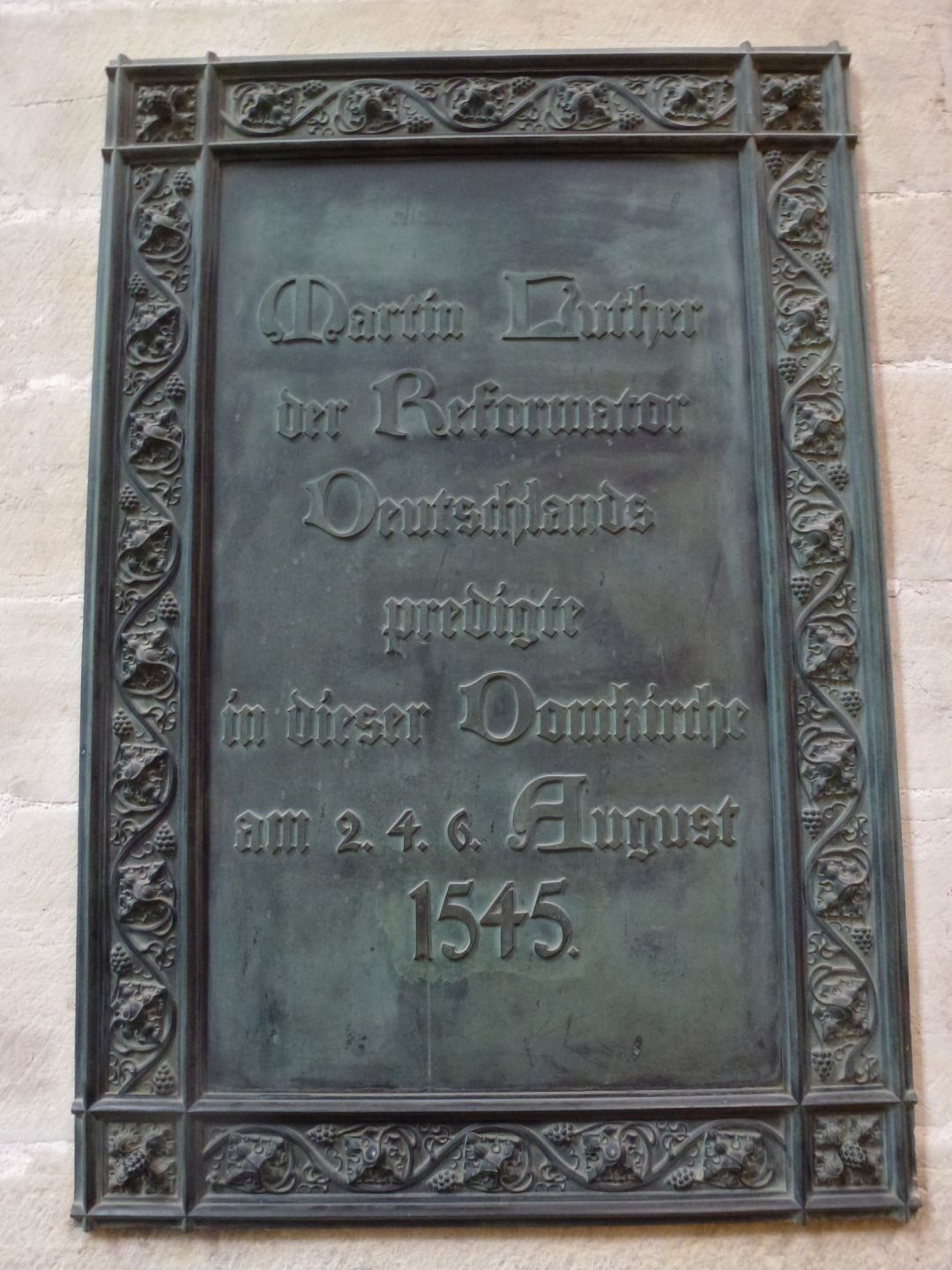 Luther-Tafel im Merseburger Dom